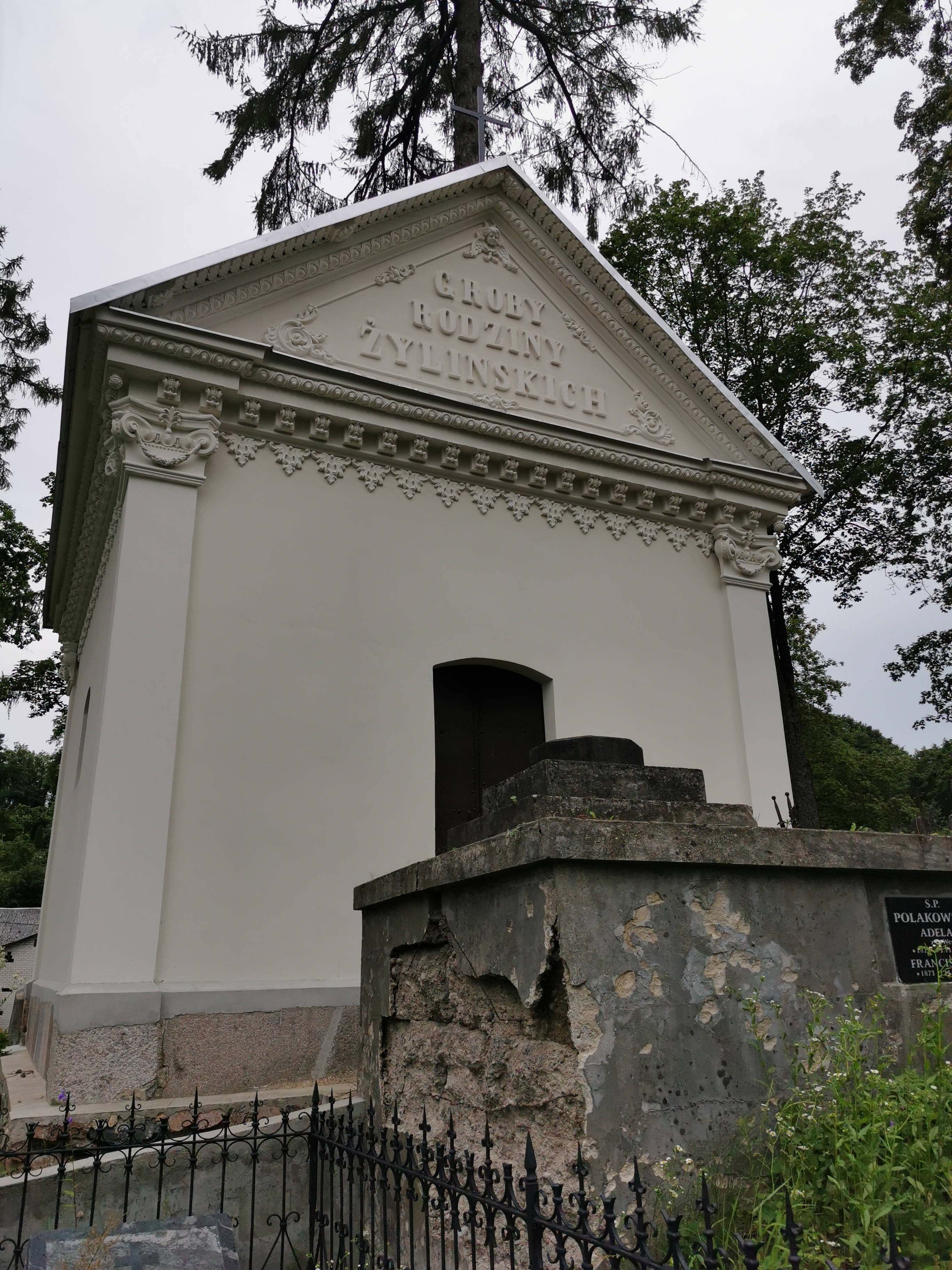 Žylinskų šeimos koplyčia